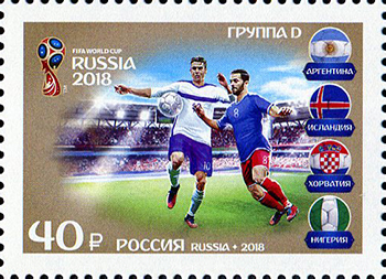 Группа D.